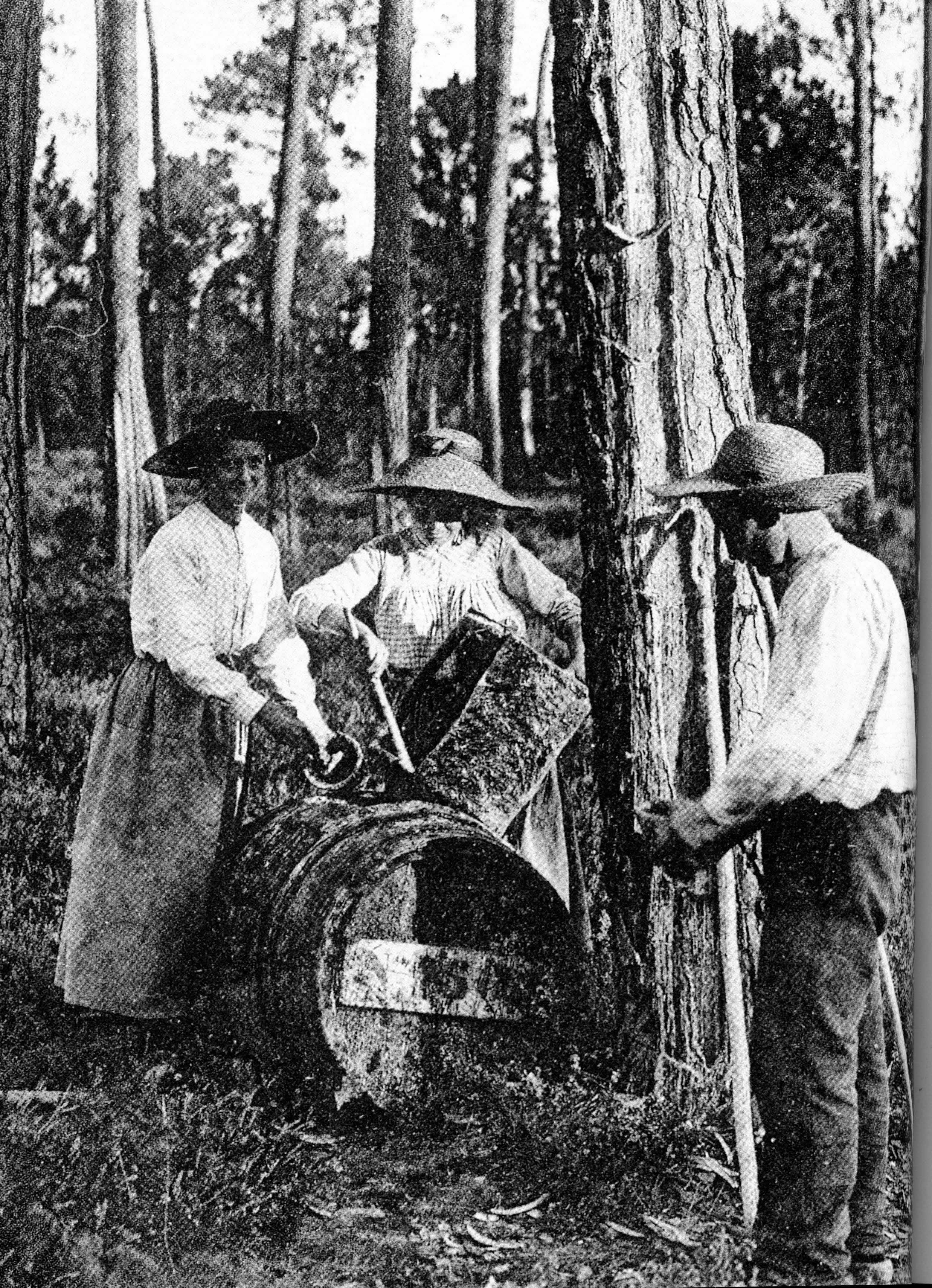 Gemmeurs en Pays de Buch au début du XXe siècle